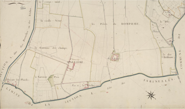 Section K 3P 4202